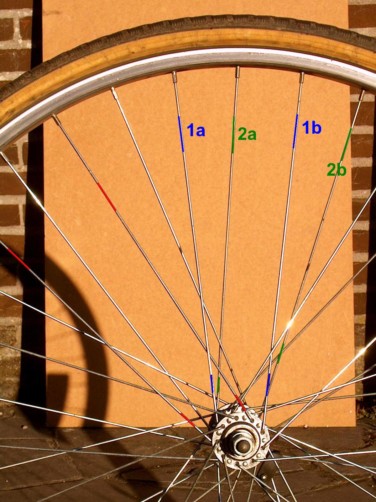 Deze foto toont hoe spaken bevestigd worden op de as zodat ze een moment kunnen overbrengen van as naar velg.